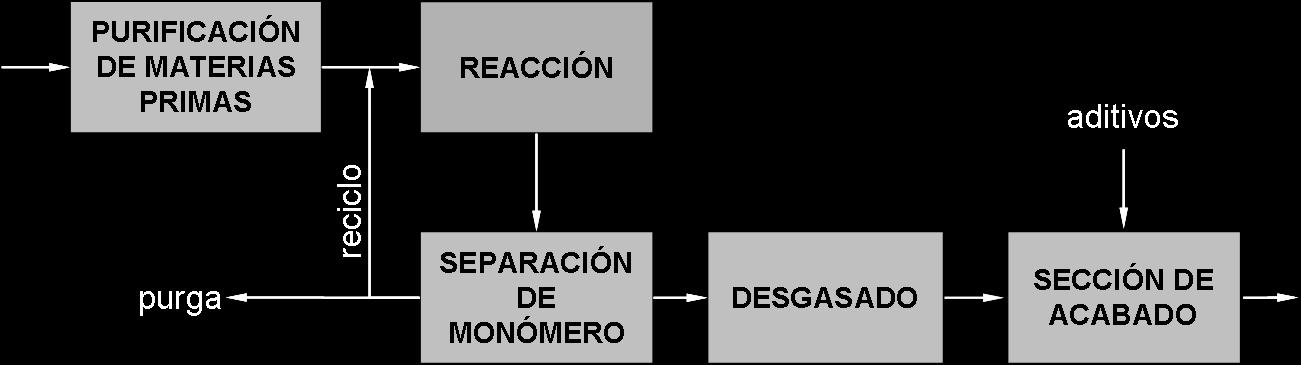 Esquema de bloques general del proceso de producción de poliolefinas.